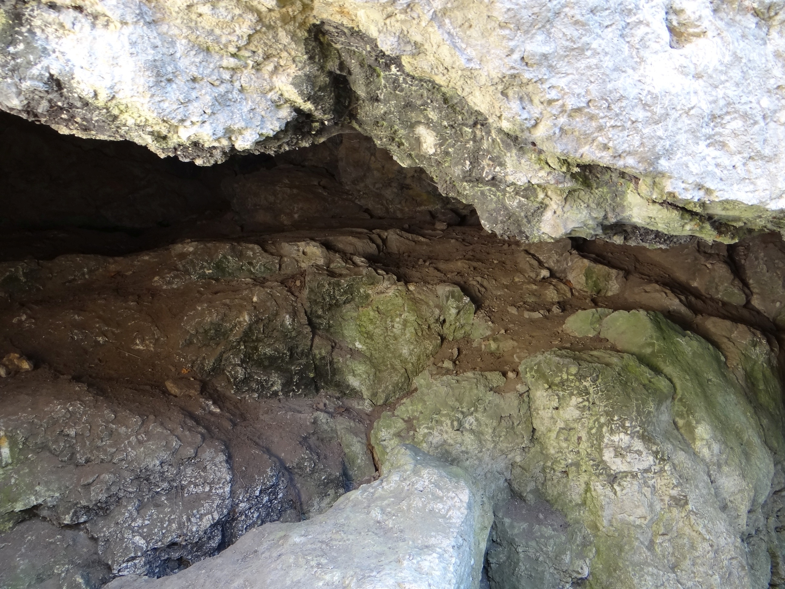 Jaskinia na Wrzosach Południowa